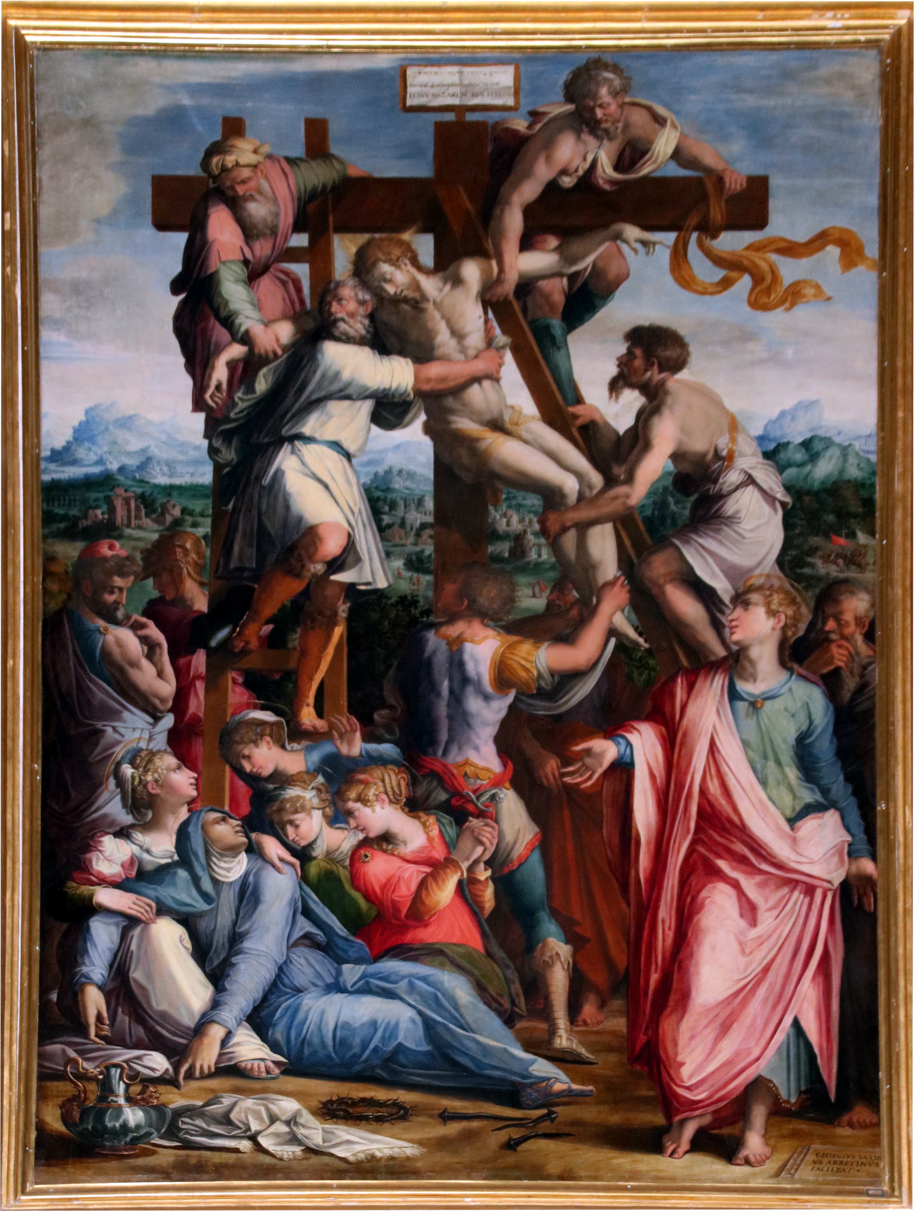 Monastero di Camaldoli (Poppi), chiesa dei Santi Donato e Ilariano